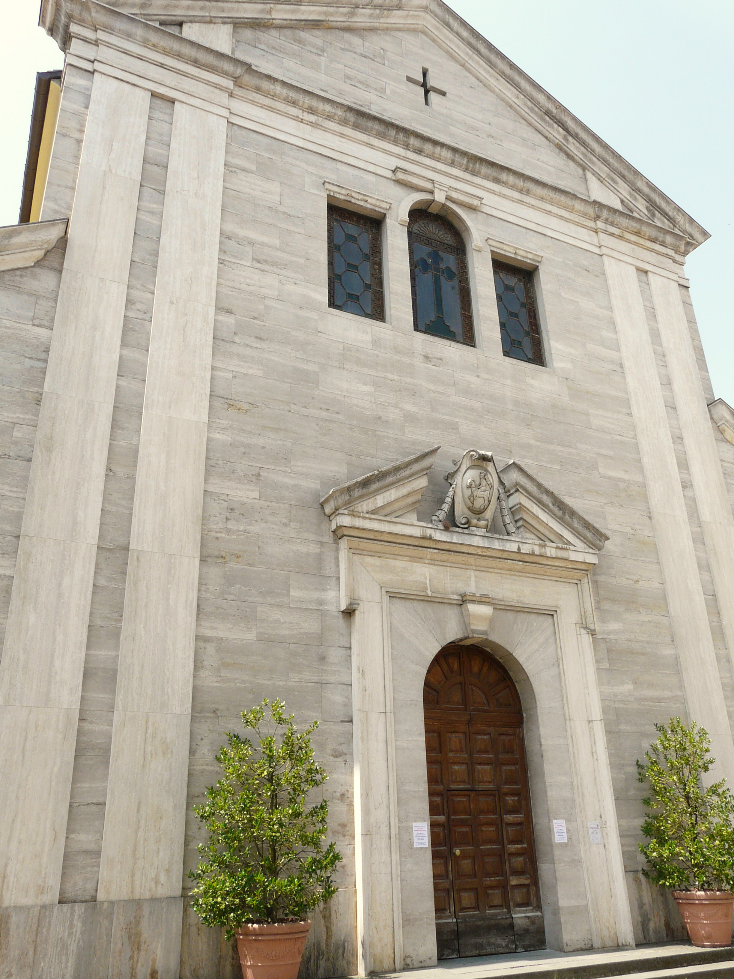 Chiesa di Sant'Antonio, Bedonia, Emilia Romagna, Italia